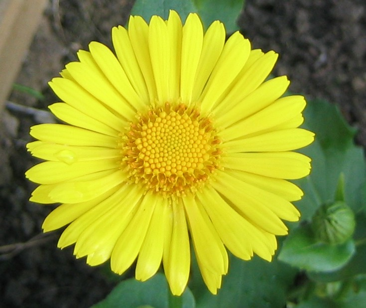 Bloem van de voorjaarszonnebloem (Doronicum orientale (spelling! 'Little Leo'). Eigen foto.